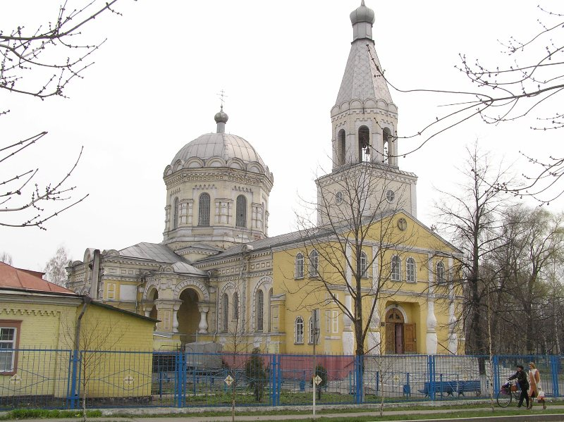 Петропавлівка Дніпропетровської області. Свято-Петропавлівська церква 1910 р.